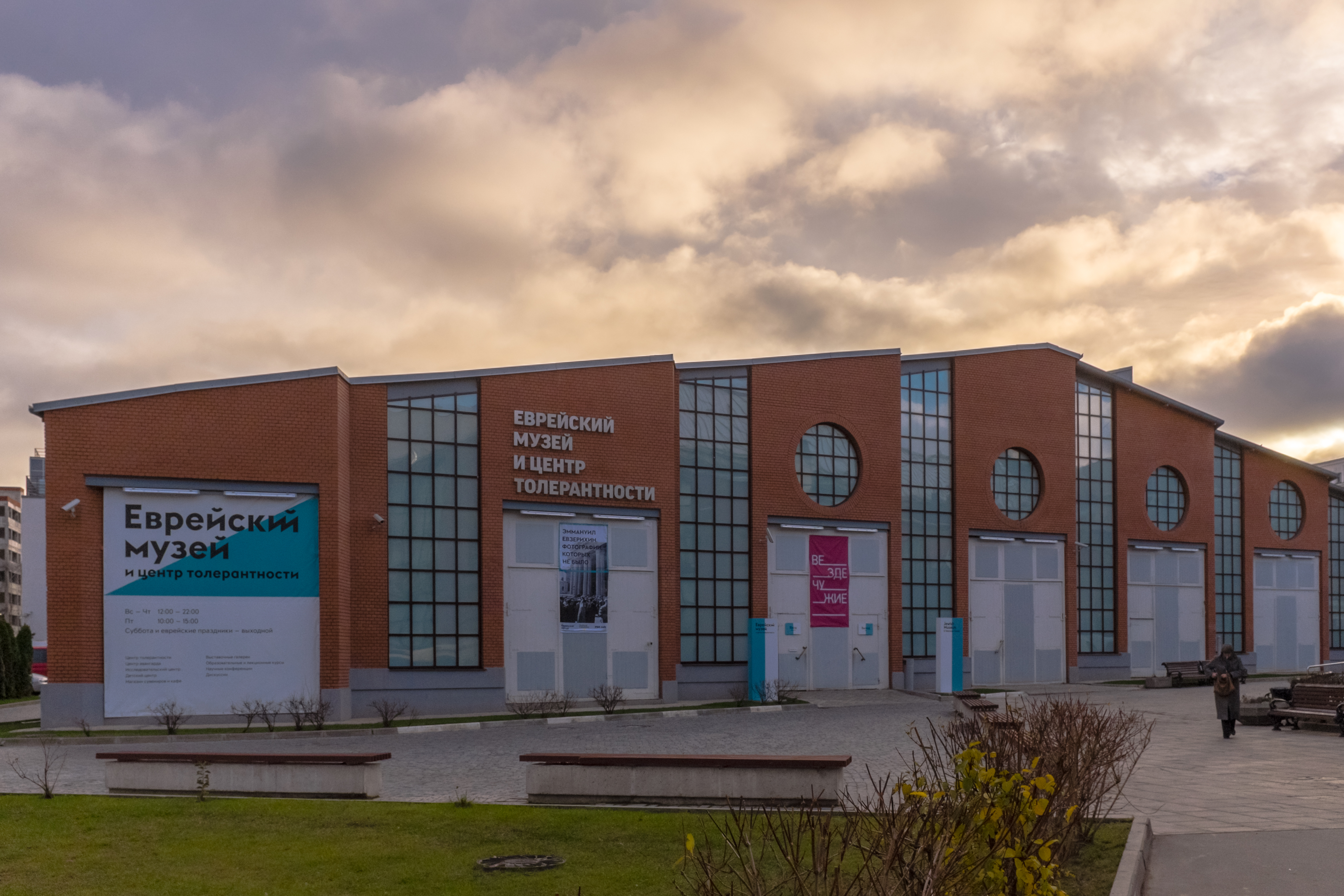 "Бахметьевский гараж" (с 2012 - Еврейский Музей Толерантности), арх. К.С.Мельников, В.Г.Шухов, 1926-27 гг. Bakhmetevsky Bus Garage (converted in 2012 into Jewish Museum and Tolerance Center), architects K.S,Melnikov, V.G,Shukhov, b.1926-27.